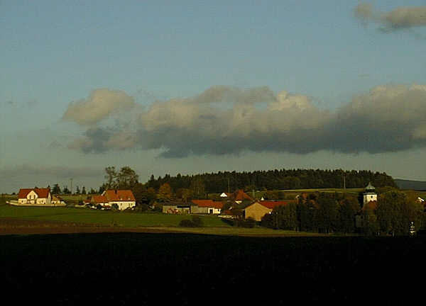 Wernersreuth